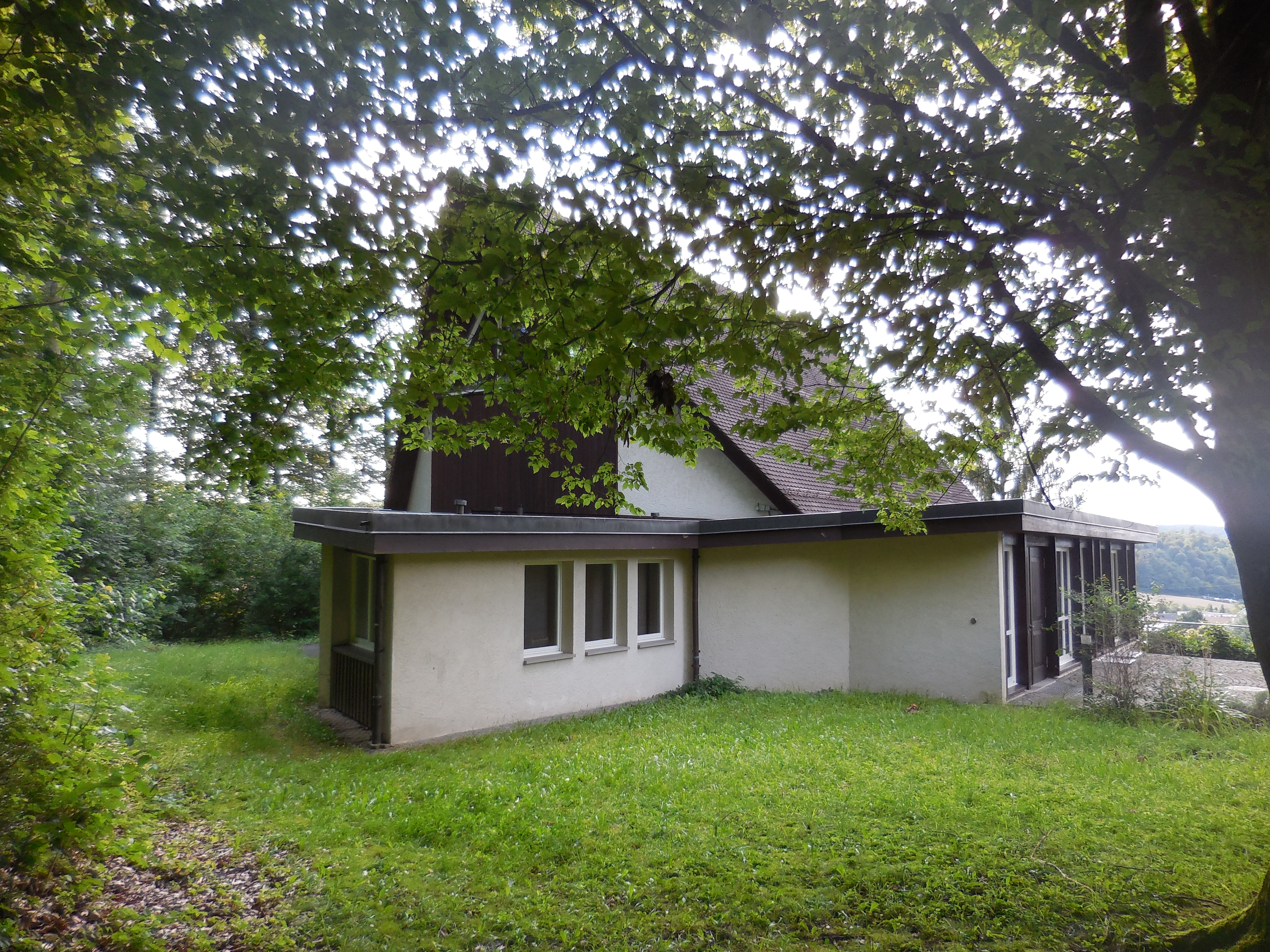 Reformierte Kirche in Hausen AG